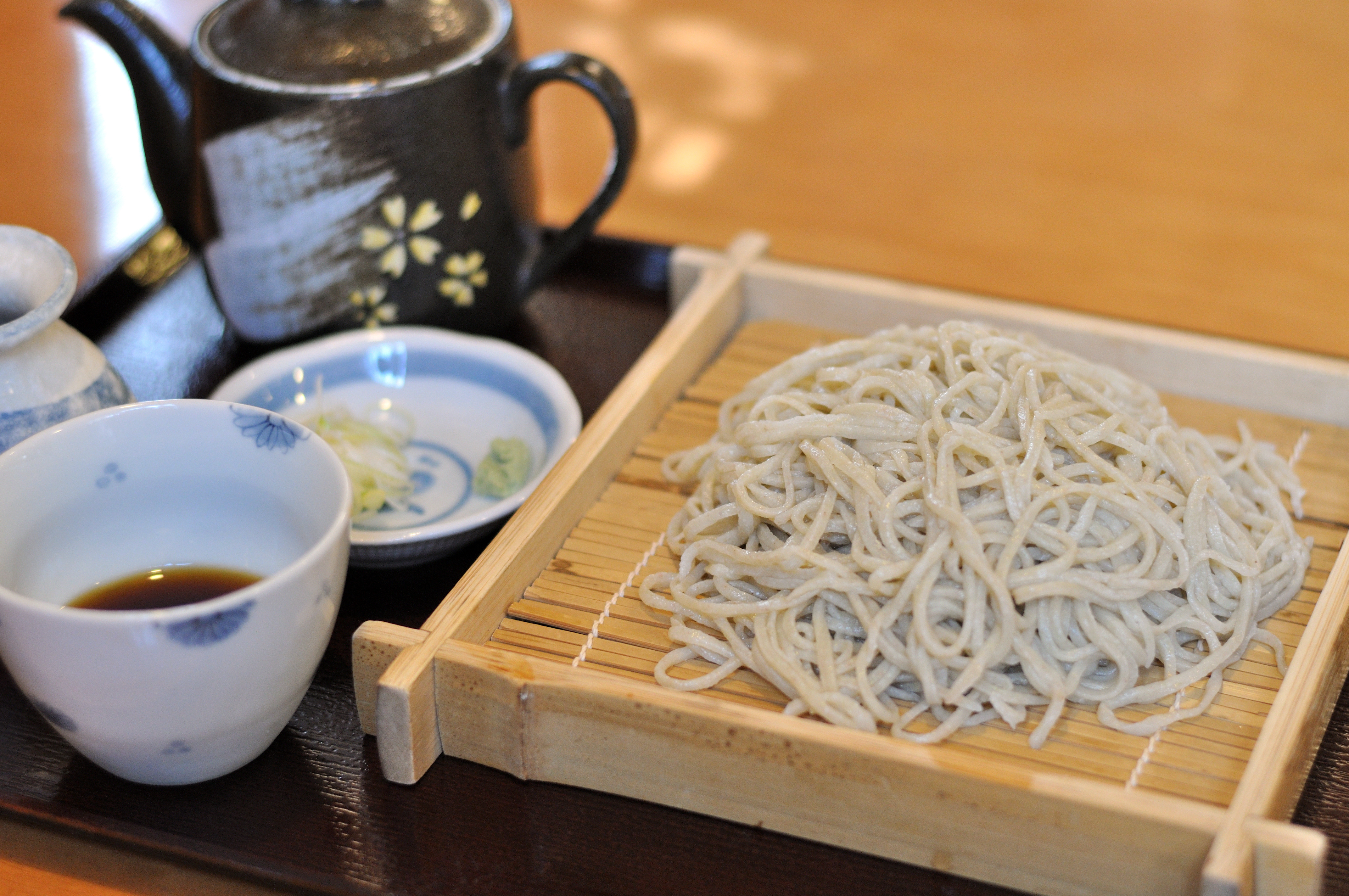 典型的なもり蕎麦の参考画像 さいたま市見沼区「小麦屋」のもりそば Nikon D5000